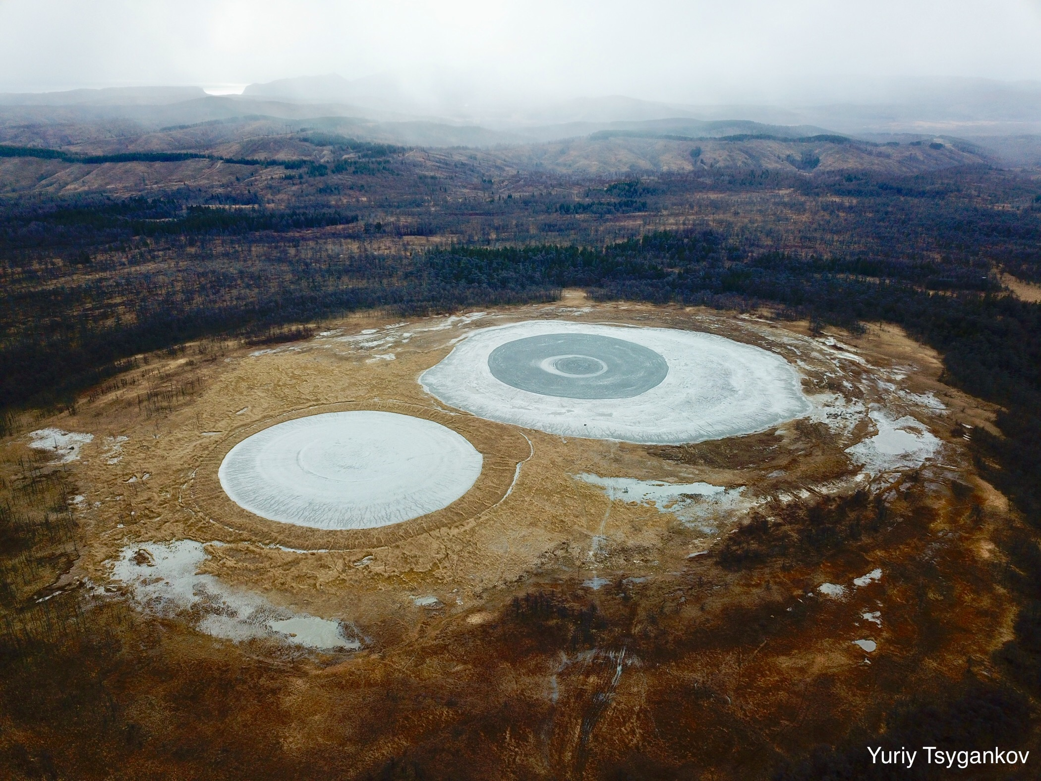 Группа Пугачевских грязевых вулканов: Памятник природы расположен близ восточного побережья о. Сахалина, недалеко от поселка Пугачево и представляет собой плоскую равнину. Центр - 48°13'23" N 142°34'37" E., Макаровский район, Сахалинская область Фото сделано на дрон. This image is related to the protected area of Russia number 6510051